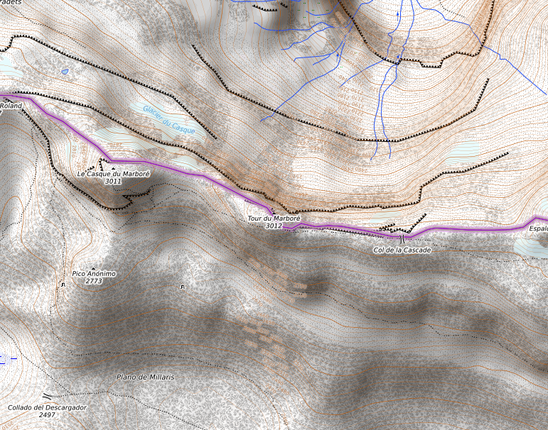 carte réalisée sur umap This map may be incomplete, and may contain errors. Don't rely solely on it for navigation.